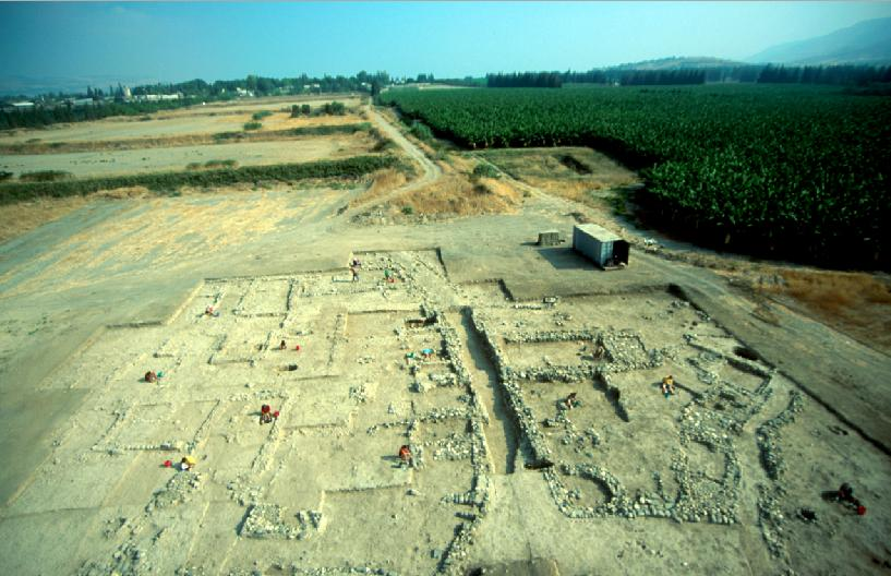 The Yarmukian Culture is a Neolithic culture of the ancient Levant. It was the first culture in Prehistoric Israel and one of the oldest in the Levant to make use of pottery. The Yarmukian derives its name from the Yarmouk River which flows near its type site at Sha'ar HaGolan, a kibbutz at the foot of the Golan Heights. The pictures are fromYosef Garfinkel excavations taken between 1989-1990 & 1998-2004 התרבות הירמוכית היא תרבות מהתקופה הניאוליתית הקרמית שמרבית שרידיה נתגלו באיזור שדות שער הגולן, והיא קיבלה את שמה על שם נהר הירמוך הזורם בסמוך. התמונת הן מחפירות שנערכו בשער הגולן על ידי הארכאולוגי יוסי גרפינקל מהאוניברסיטה העברית . נערכו 2 עונות חפירה 1990-1989, ו 1996-2004. צילום של אתר שער הגולן